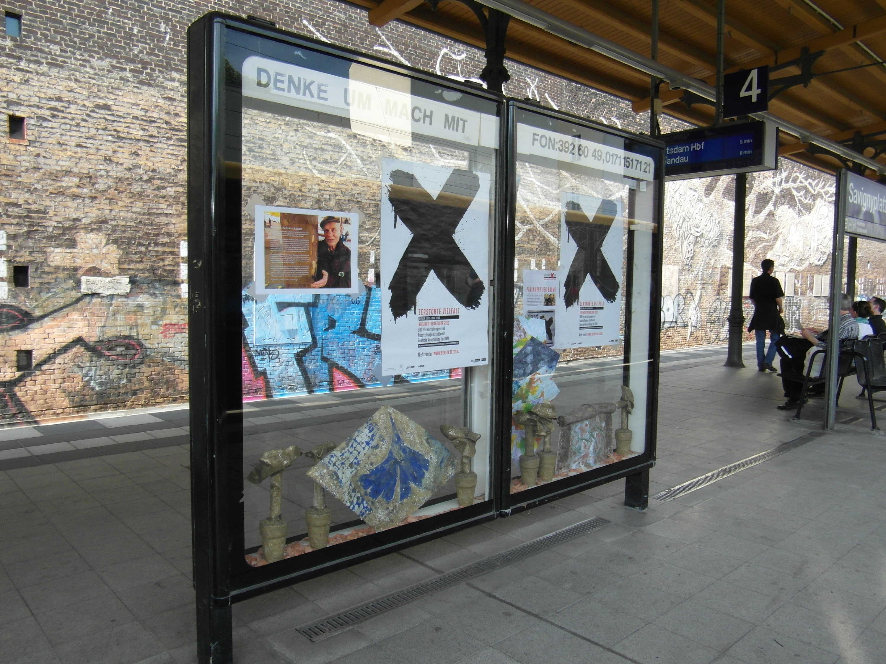 Berlin - S-Bahnhof Savignyplatz in Charlottenburg - Linien S5, S7, S75 - und irgendwann wieder S3 und S9